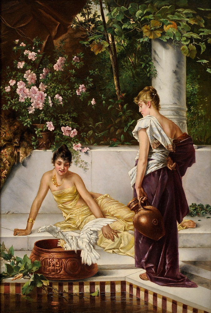 Die Odalisken. Öl/Lwd., 88 x 62 cm Unbekannter Meister 19. Jhdt.